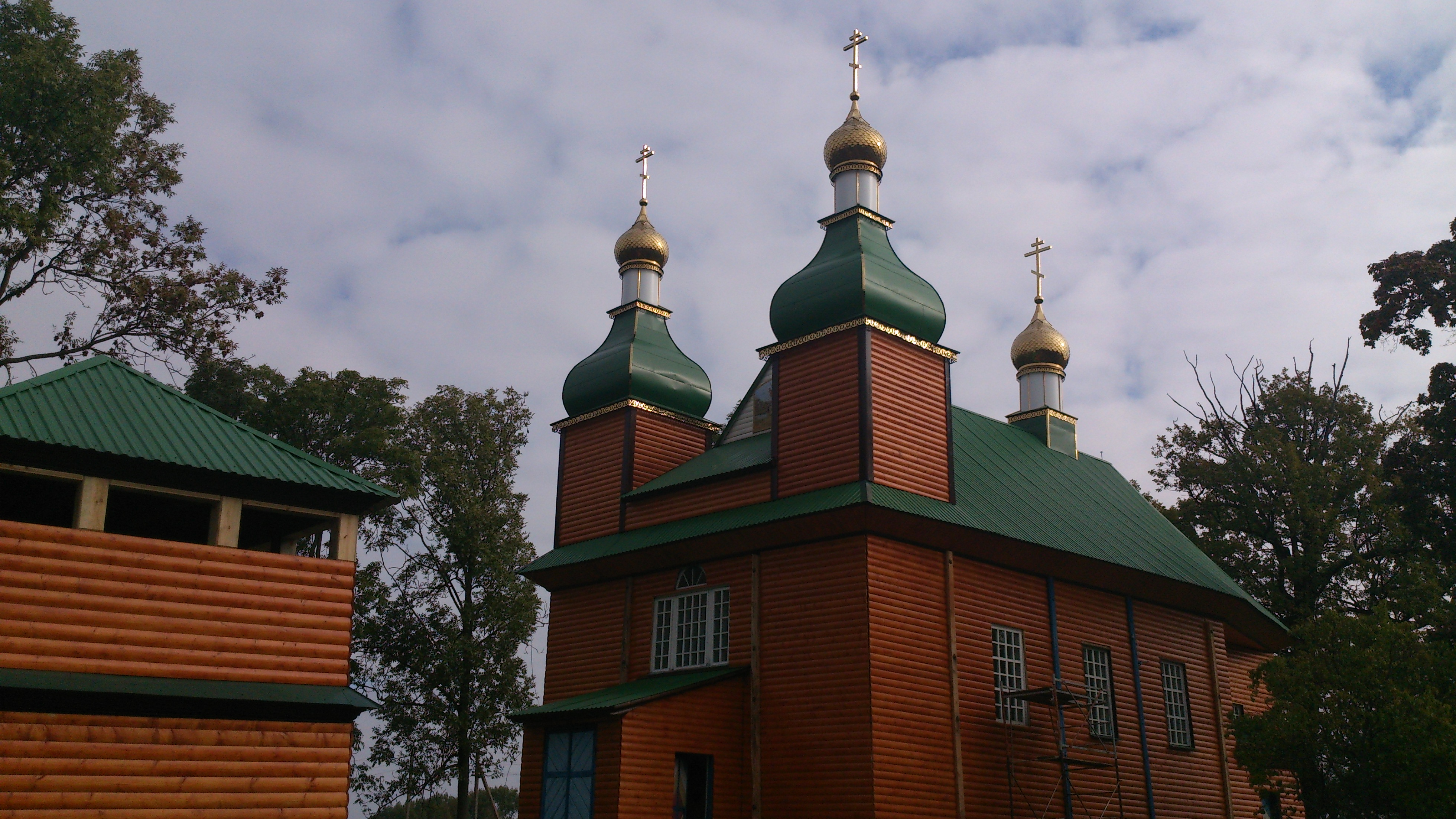 Беларуская (тарашкевіца): Юр’еўская царква ў Валаўлі пасьля рэканструкцыі. Кастрычнік 2015